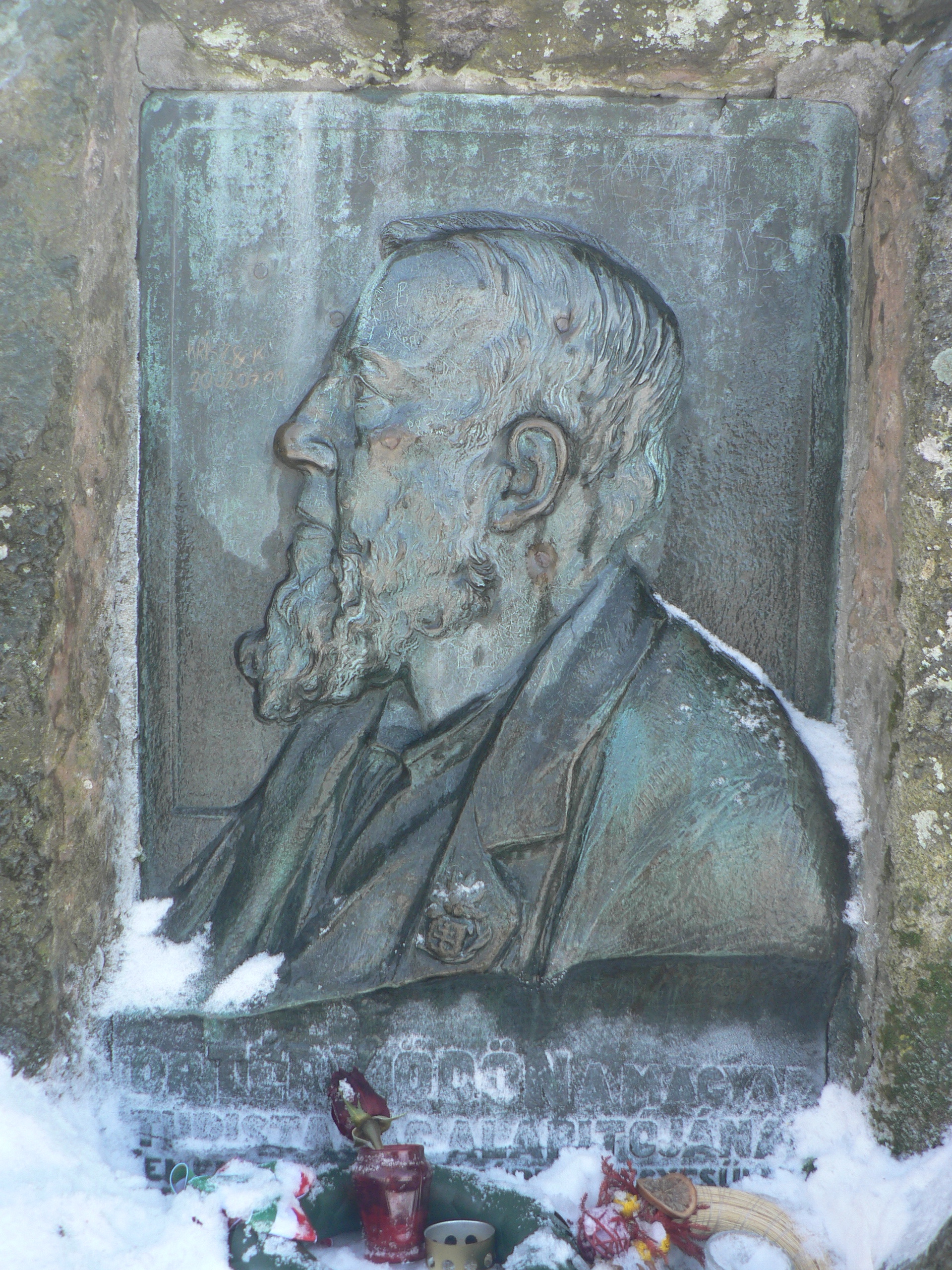 Téry Ödön's Monument at Dobogókő Sculptor: Krisztián Sándor (1926)[1]